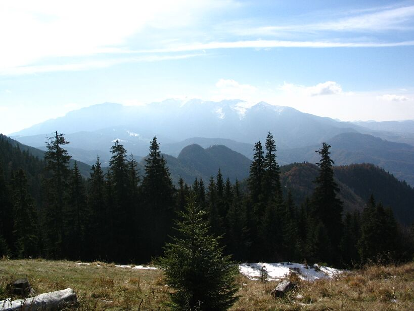 A Bucsecs-hegység északi része a Keresztényhavasról. Középen a legmagasabb hegy, a 2507 méteres Omu-csúcs (Erdély)